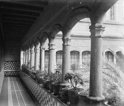 Imatge